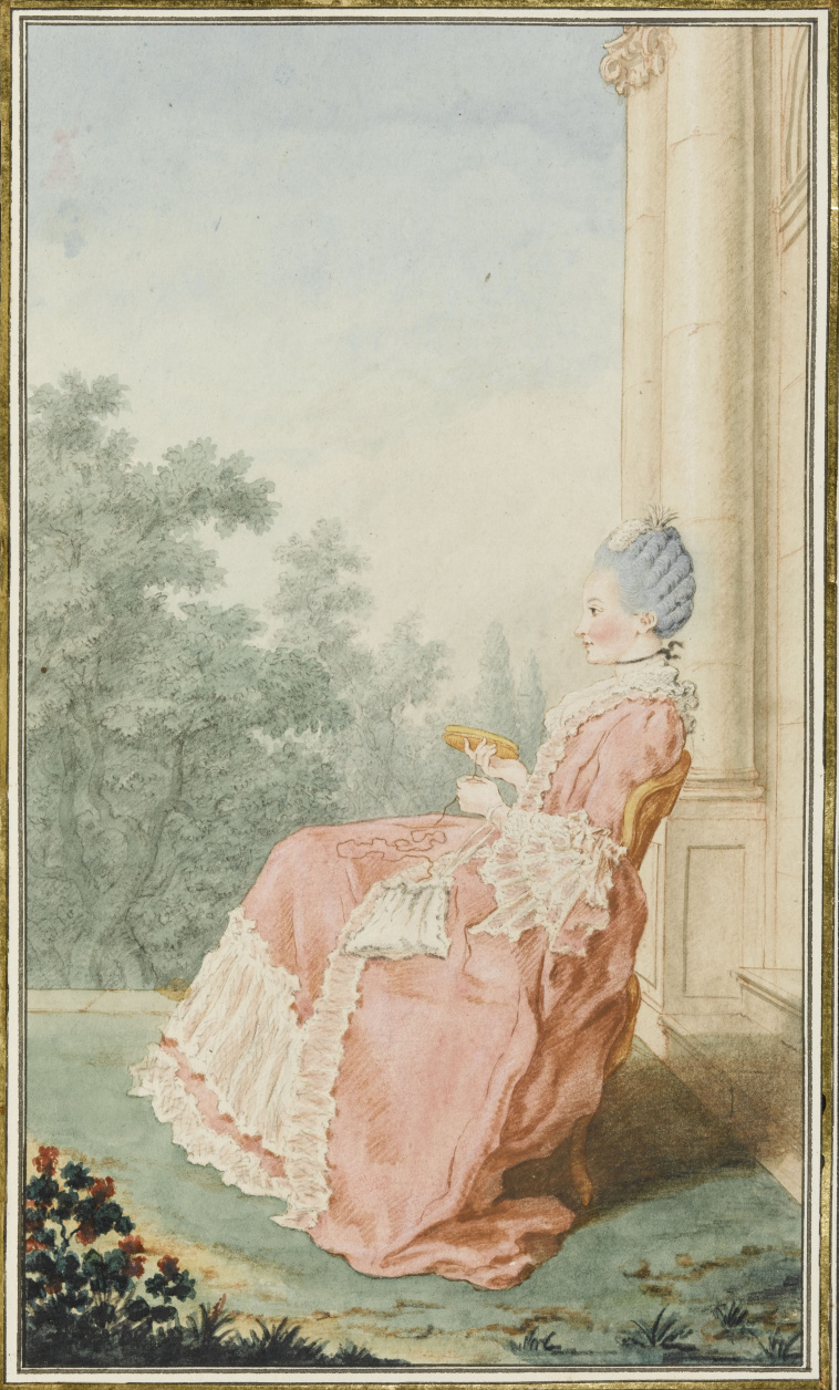 Madame d'Esmangart,, intendante de Lille